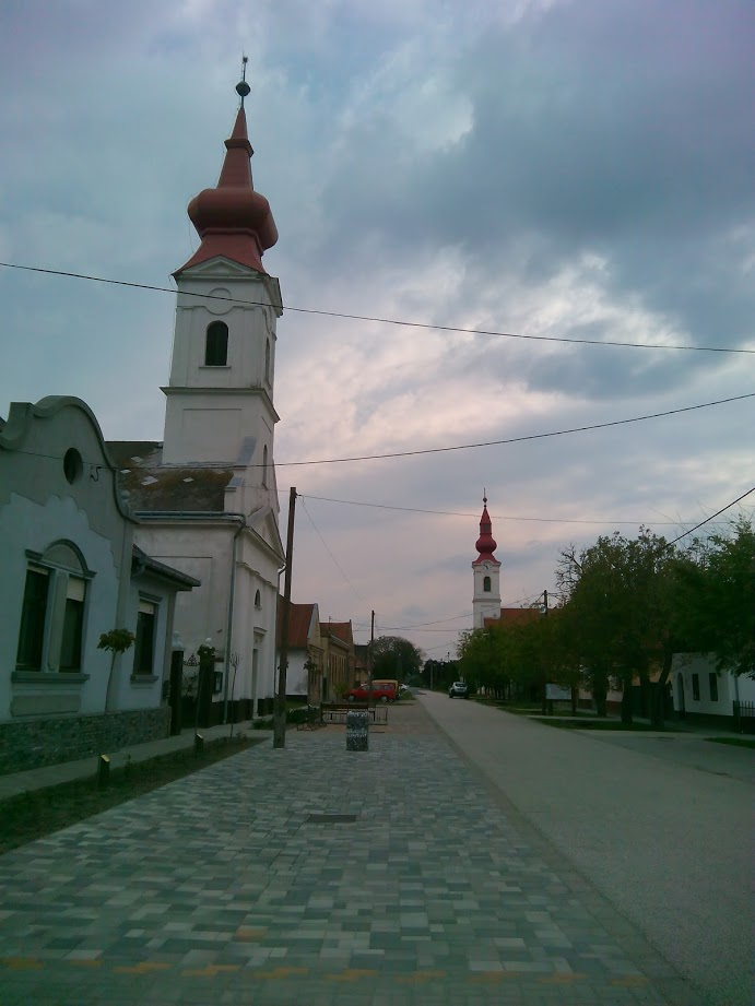 Harta utcarészlet